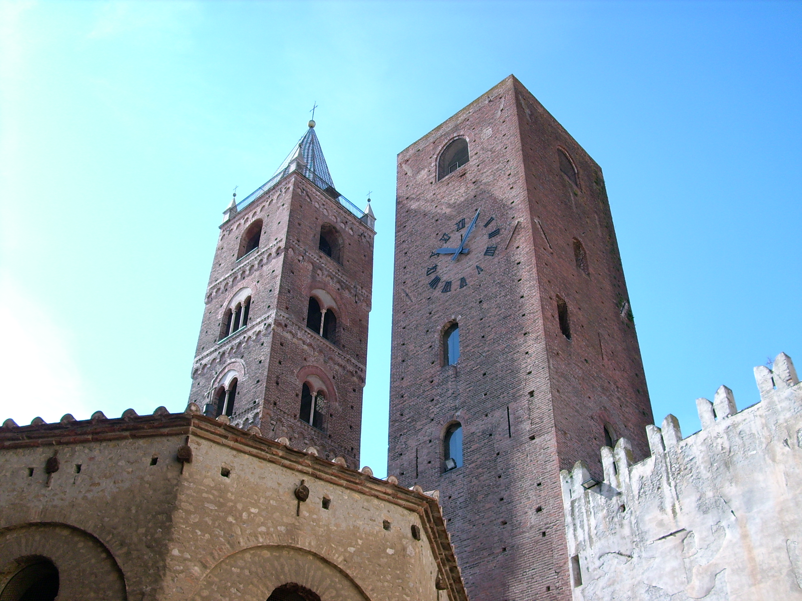 Centro storico di Albenga, Liguria, Italia